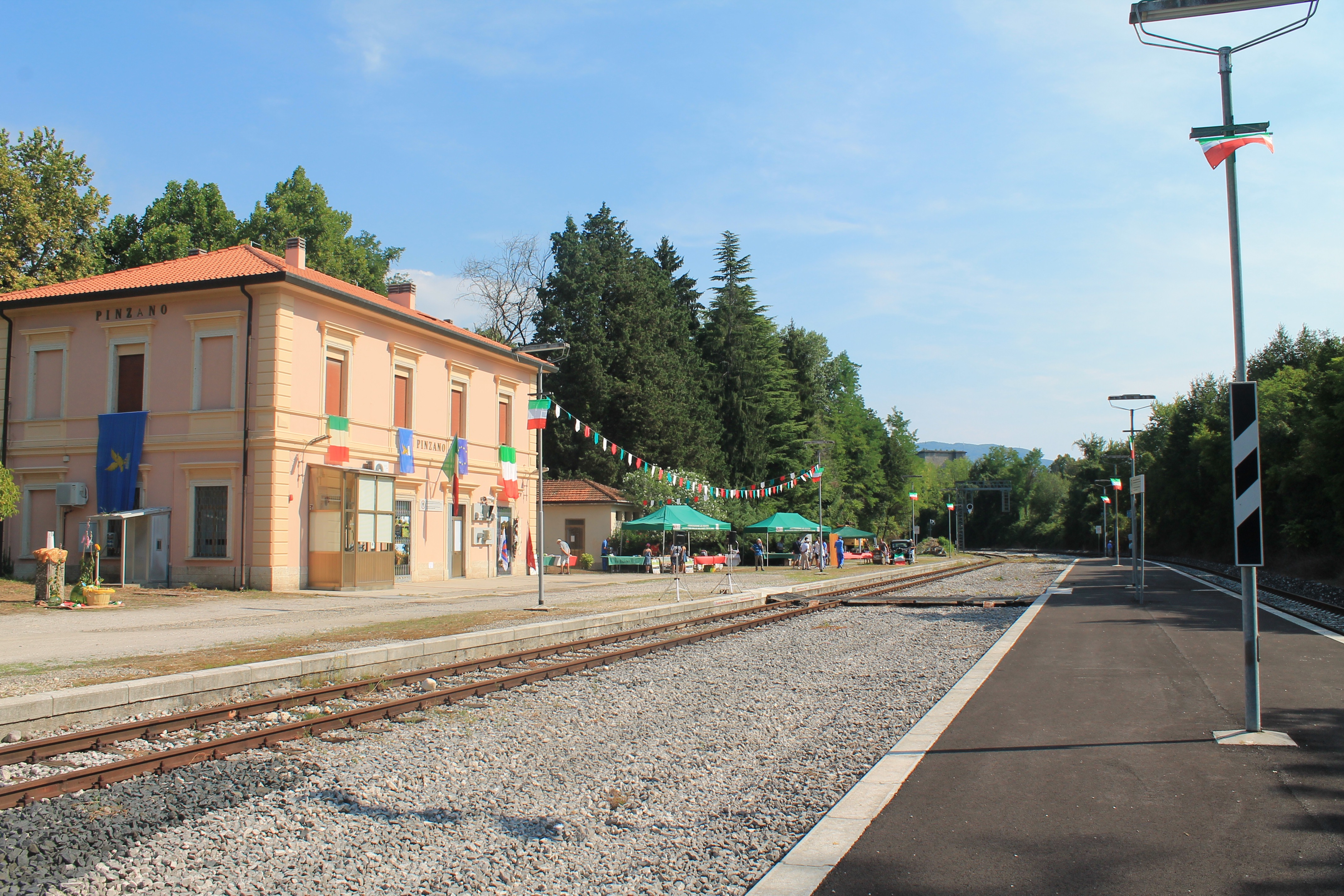 Re-inaugurazione della stazione di Pinzano il 29 luglio 2018